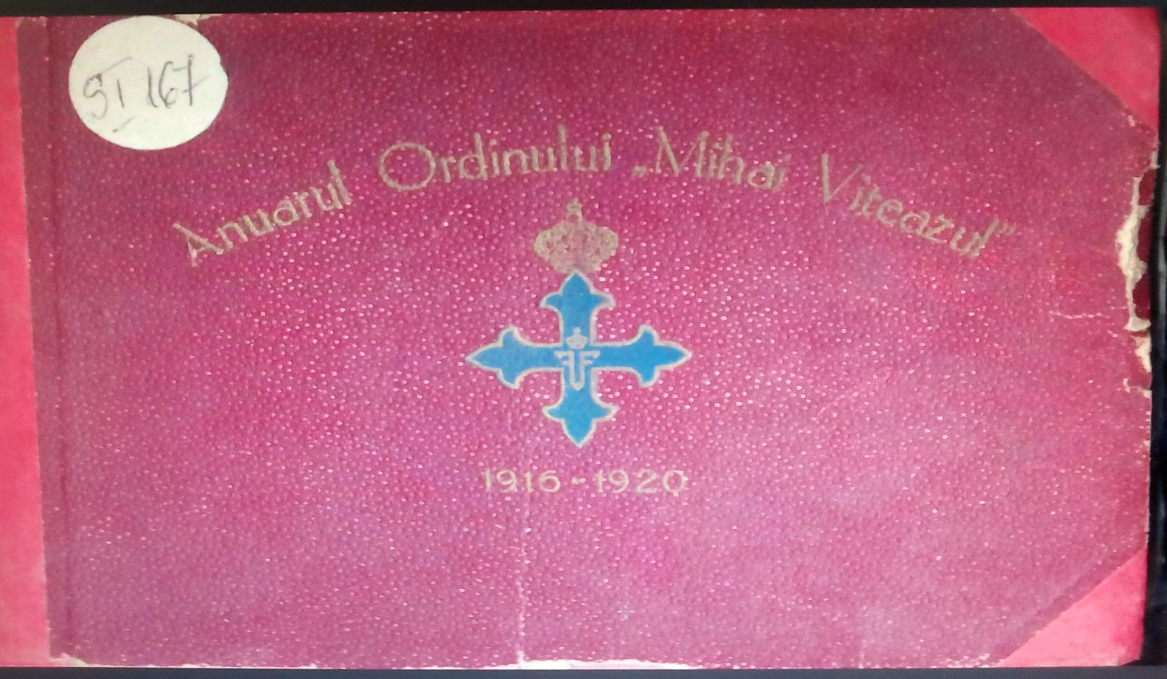 Coperta Anuarului ordinului Mihai Viteazu Sursa: lucrarea - Ministerul de Răsboiu, Anuarul ofiţerilor şi drapelelor Armatei Române cărora li s-au conferit ordinul „Mihai Viteazul”, Atelierele grafice „Socec & Co”, Bucureşti, 1922 Restricţii - fără restricţii datorită vechimii. Este un document oficial al statului român